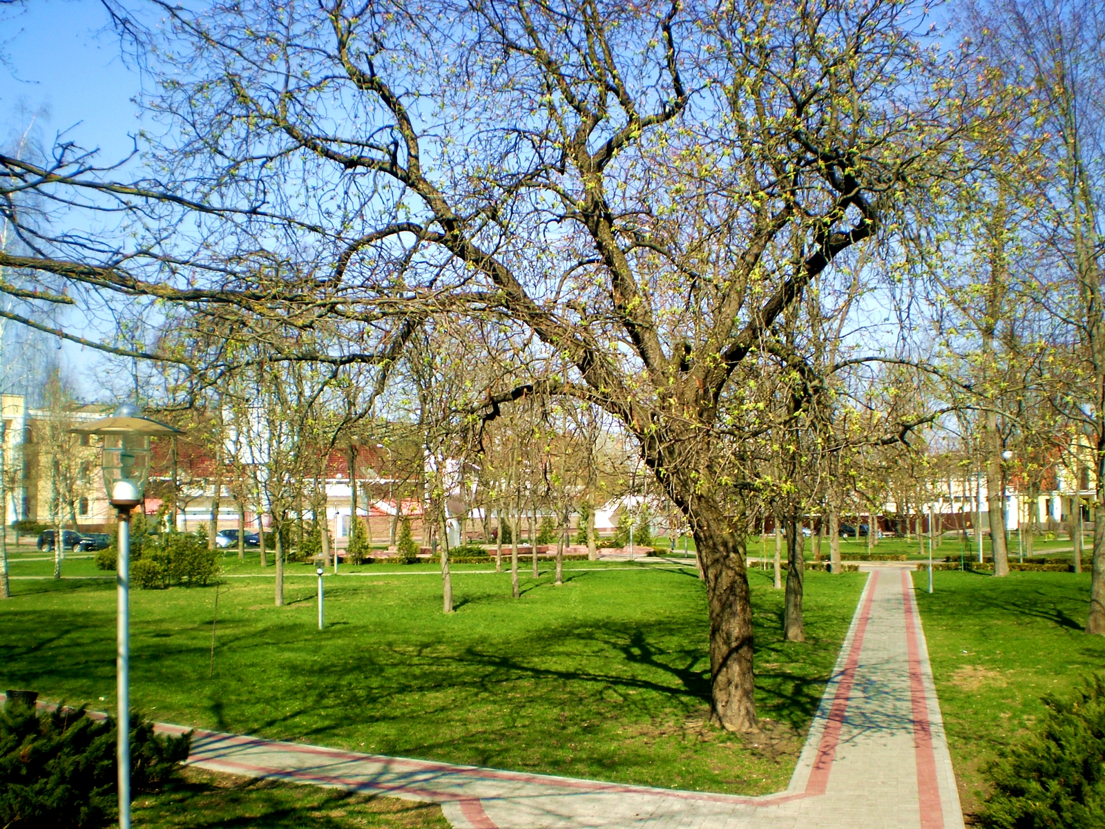 Сквер Іконнікава